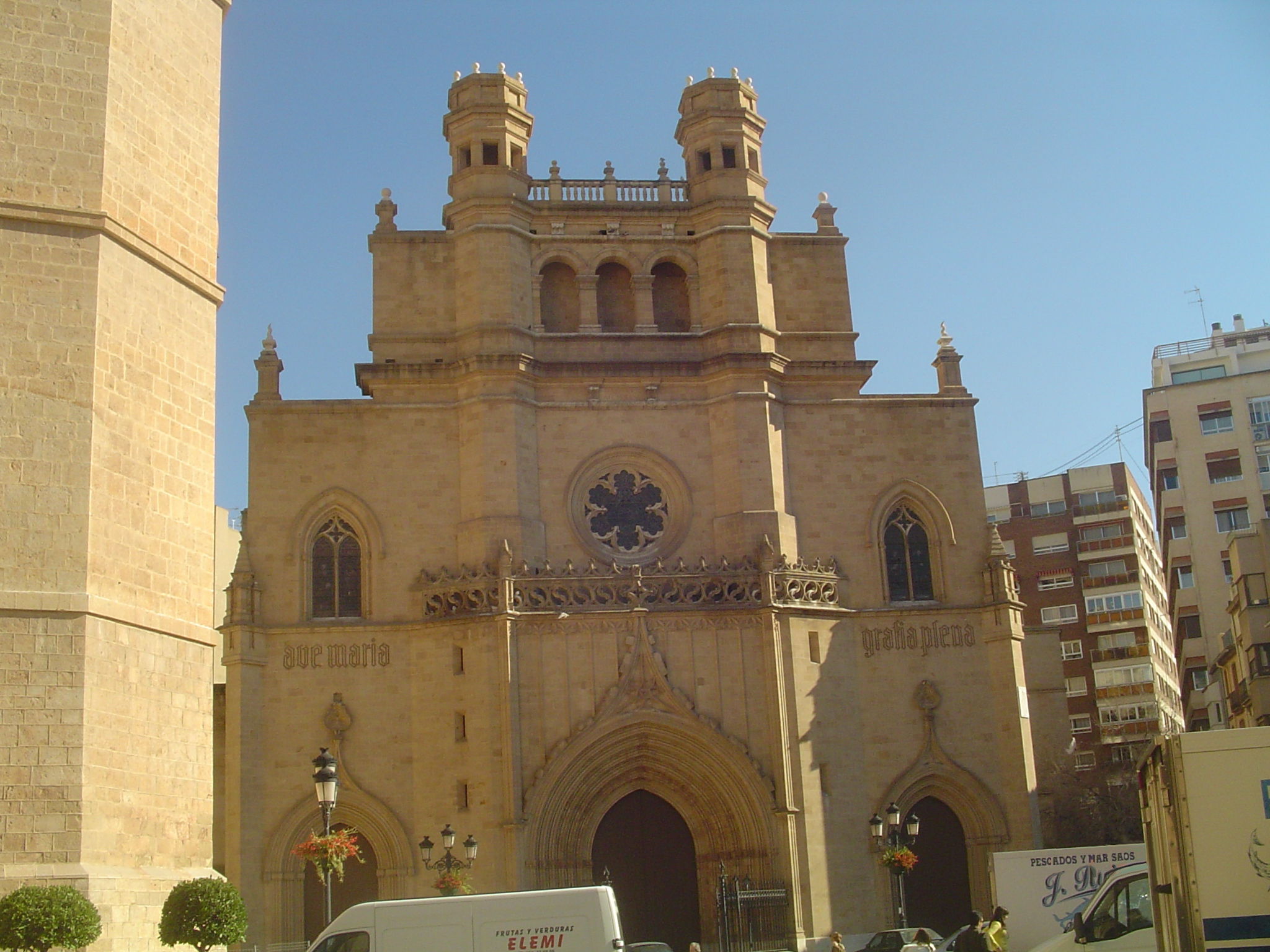 Fachada principal de la Concatedral de Santa María (Castellón de la Plana, España)